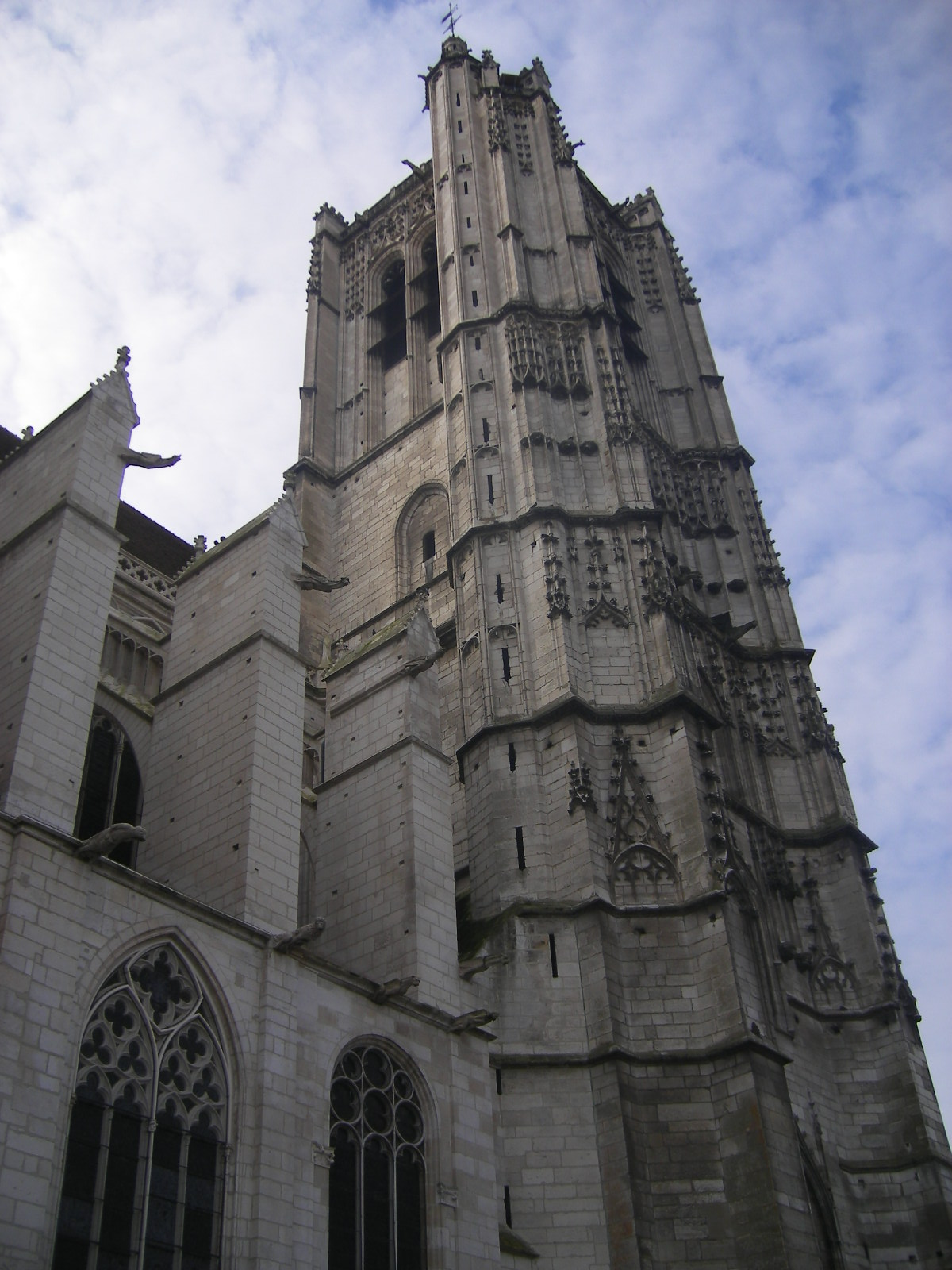 Cathédrale Saint-Étienne d'Auxerre